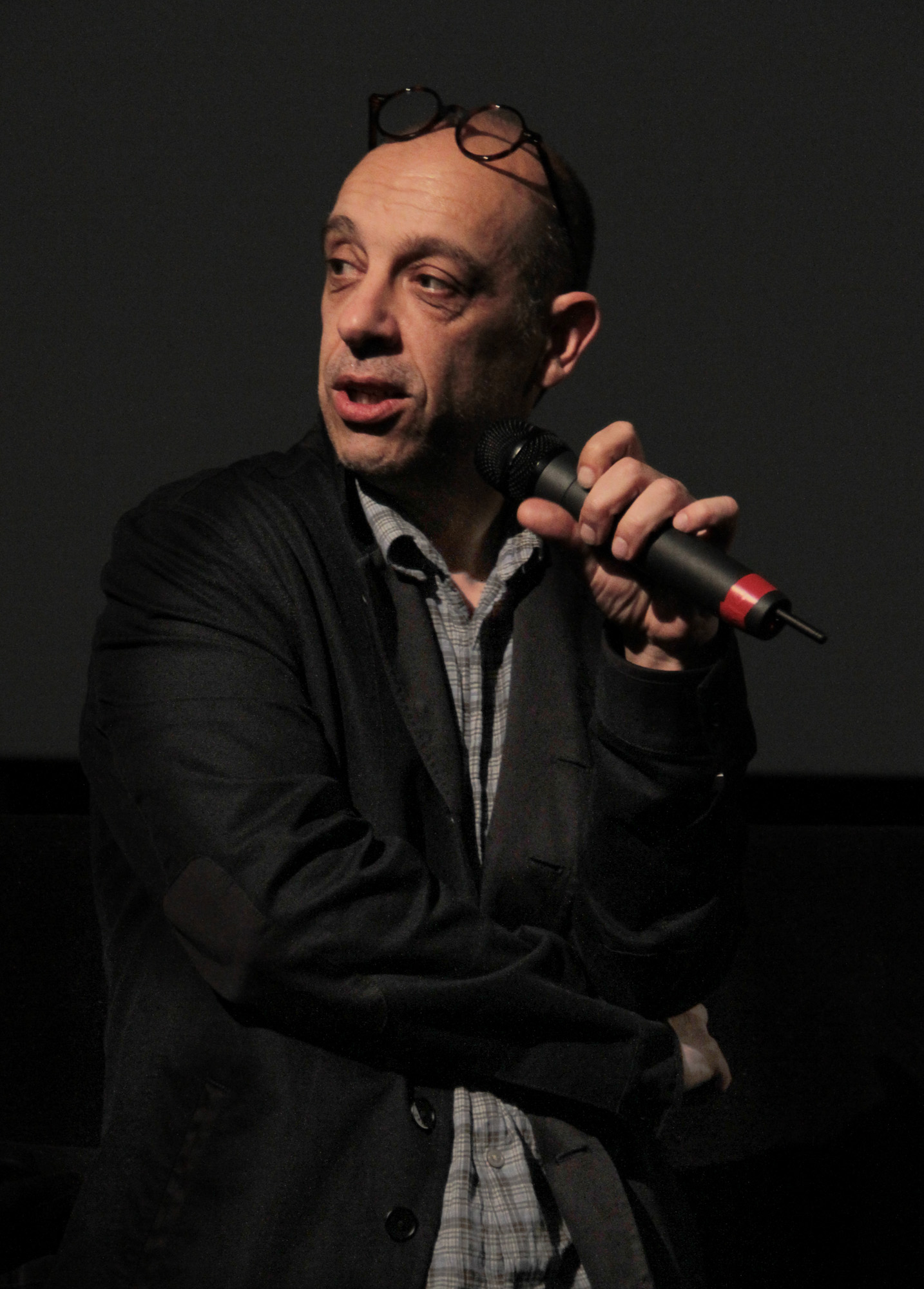 Bruno Delbonnel répondant aux questions des étudiants du ciné club Louis Lumière (Cinéma le Grand Action, Paris, juin 2012)